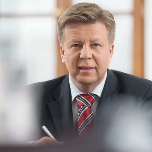 Stadtrat der Landeshauptstadt München und Kandidat für den Bayerischen Landtag München-Bogenhausen